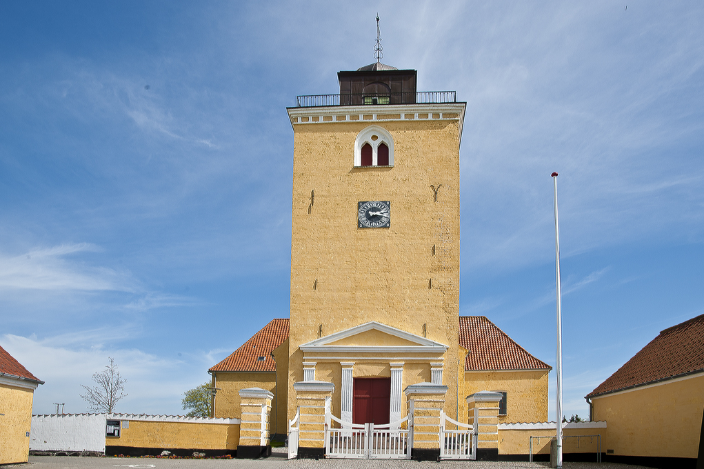 Køng Kirke i Vordingborg Kommune Danmark